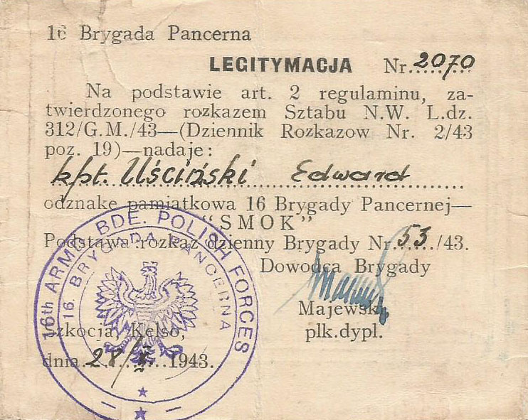 Odznaka Pamiątkowa 16 Brygady Pancernej - Edward Uściński